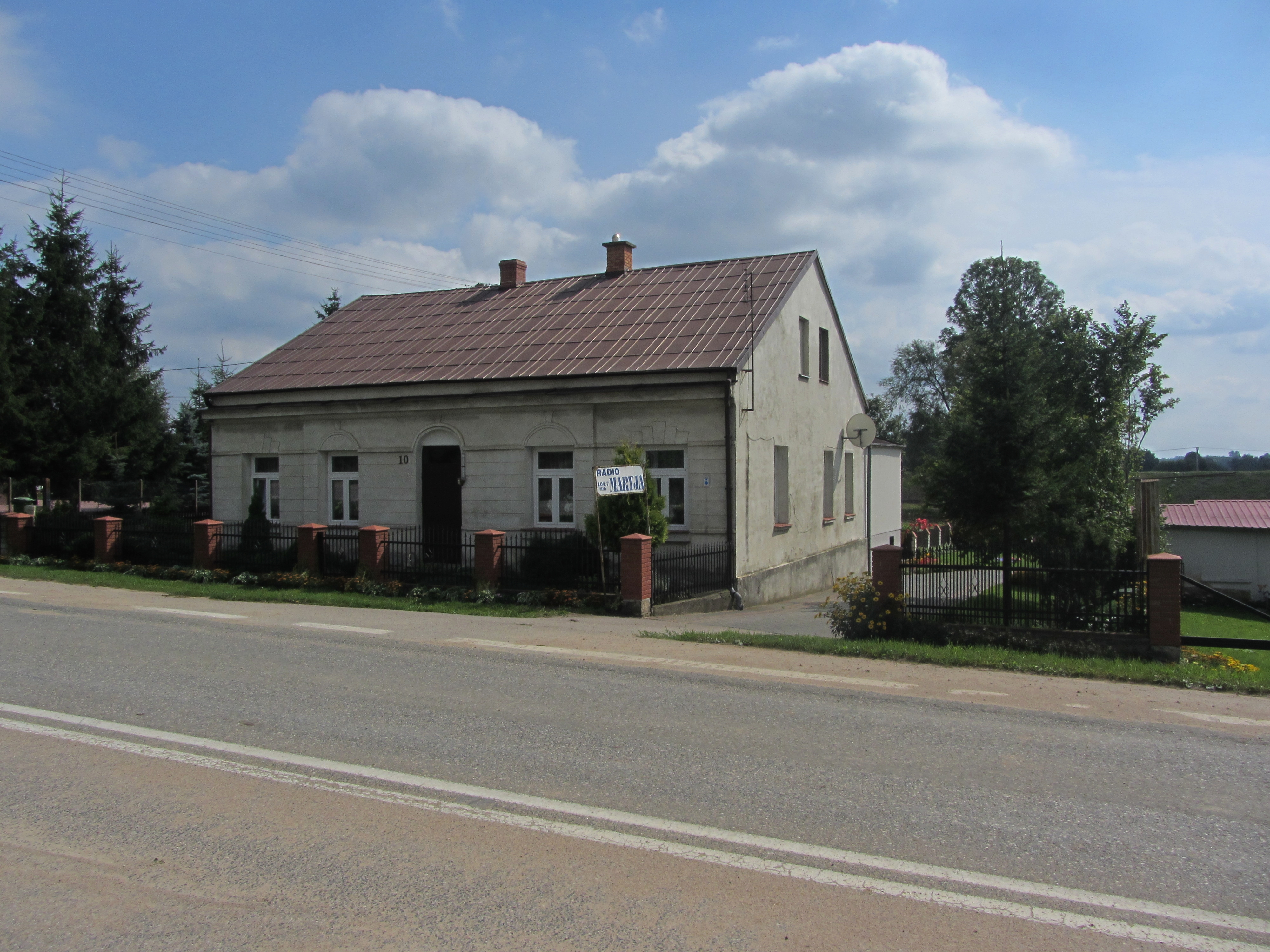 Budynek asesorii straży granicznej w Żółtkach, gm. Choroszcz. Żółtki, Choroszcz 01.1984.